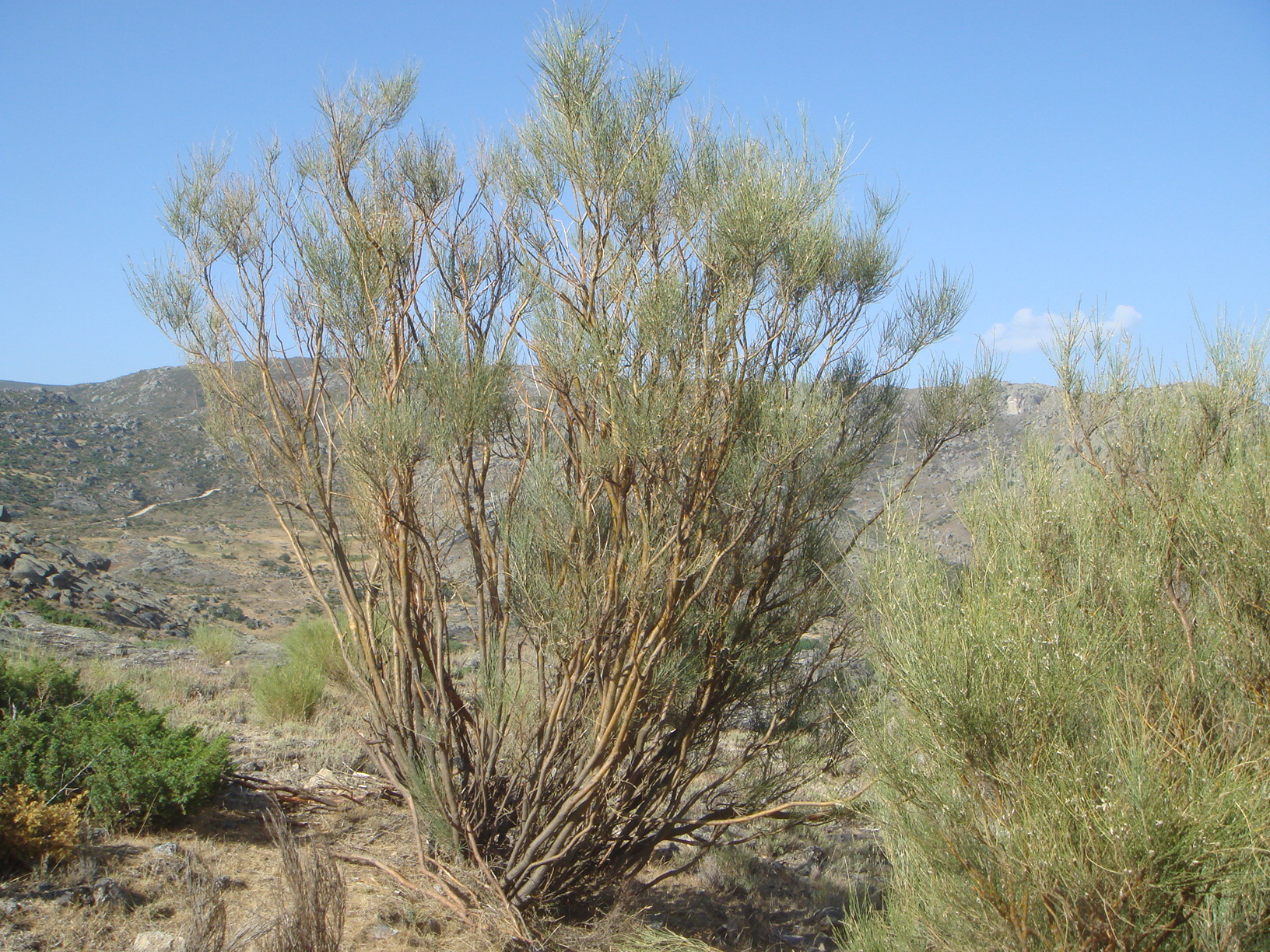 Hiniesta (Genista cinerascens), matorral-maquis, Paramera de Ávila, (Ávila) España